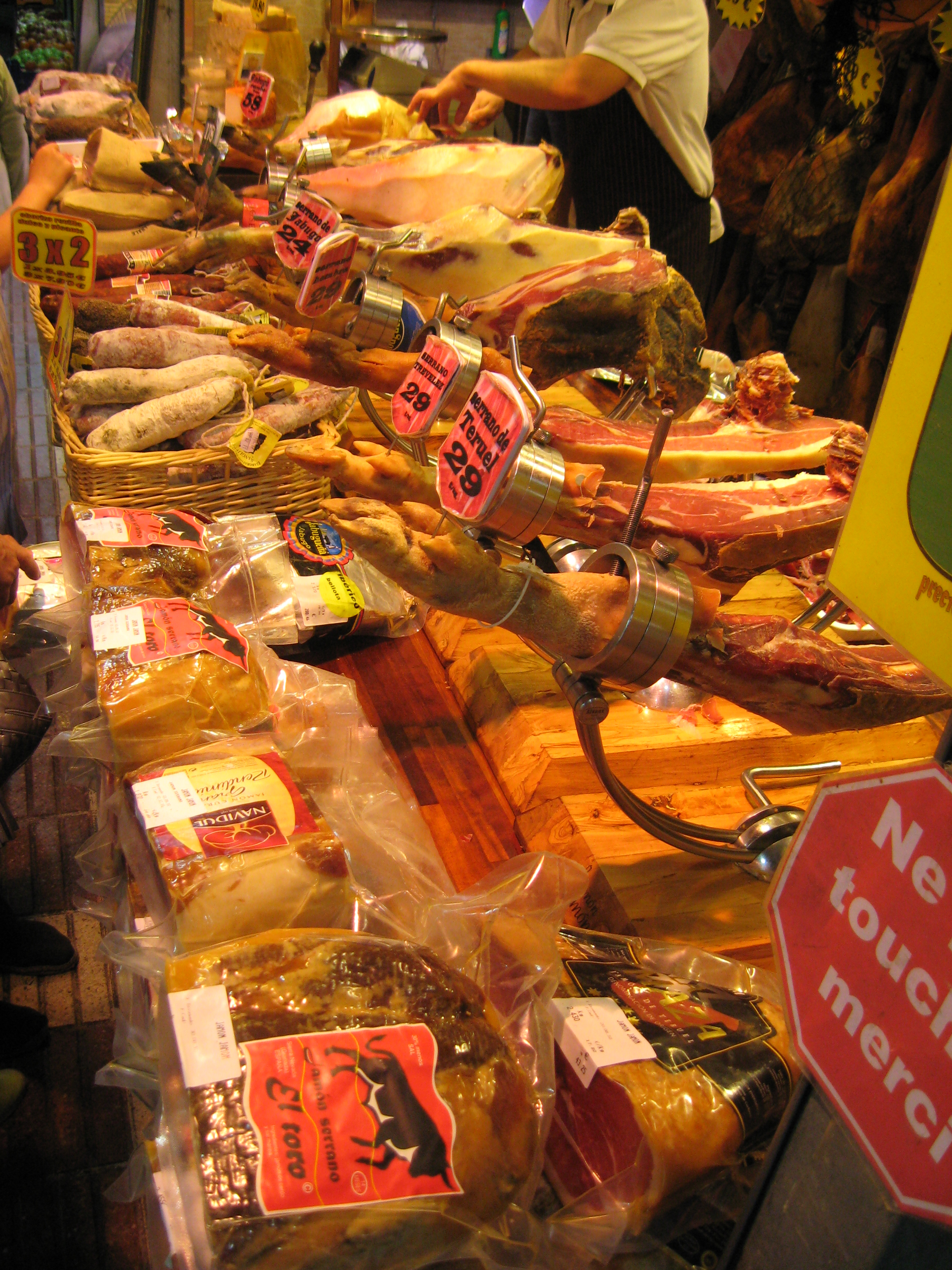 Serranoschinken in der Markthalle von Roses Datum: 08.09.2010 Urheber: Michael Pfeiffer alias Benutzer:Gordito1869 Quelle: privates Fotoarchiv des Urhebers